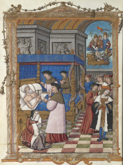 Mort de Dagobert Ier. Guillaume Crétin, chroniques françaises. XVIème siècle, Rouen. Bibliothèque Nationale de France.